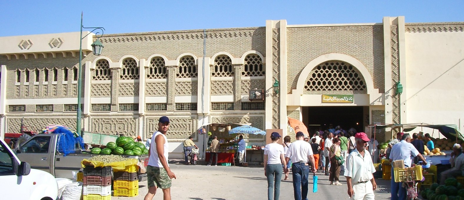 Mecat de Tozeur